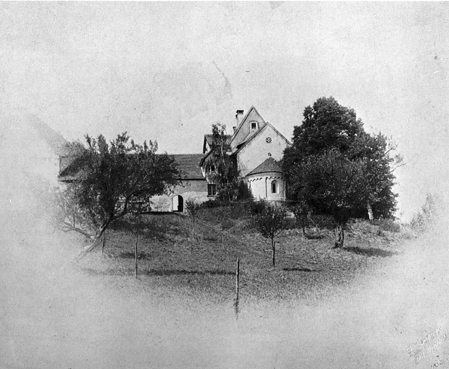 Tübingen, Schwärzloch, Die romanische Apsis, Sinner-Archiv 1/770, 168*220 mm